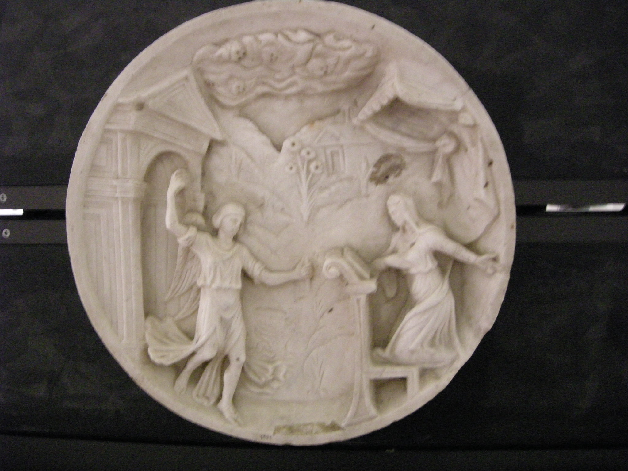 Properzia de' Rossi, Annunciazione, opera esposta nel Museo civico medievale a Bologna.